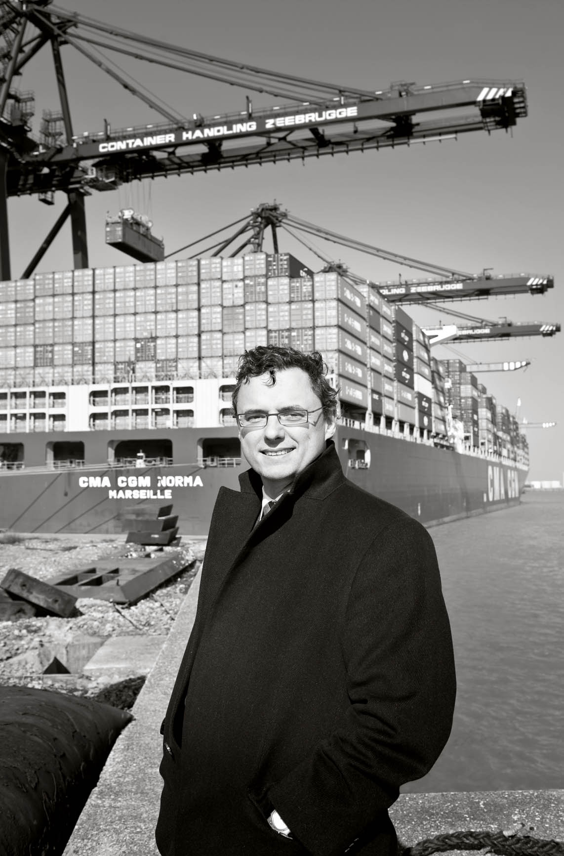 Joachim Coens,voorzitter en gedelegeerd bestuurder van de Maatschappij van de Brugse Zeevaartinrichtingen, het bedrijf dat de haven van Brugge-Zeebrugge bestuurt en uitbaat.